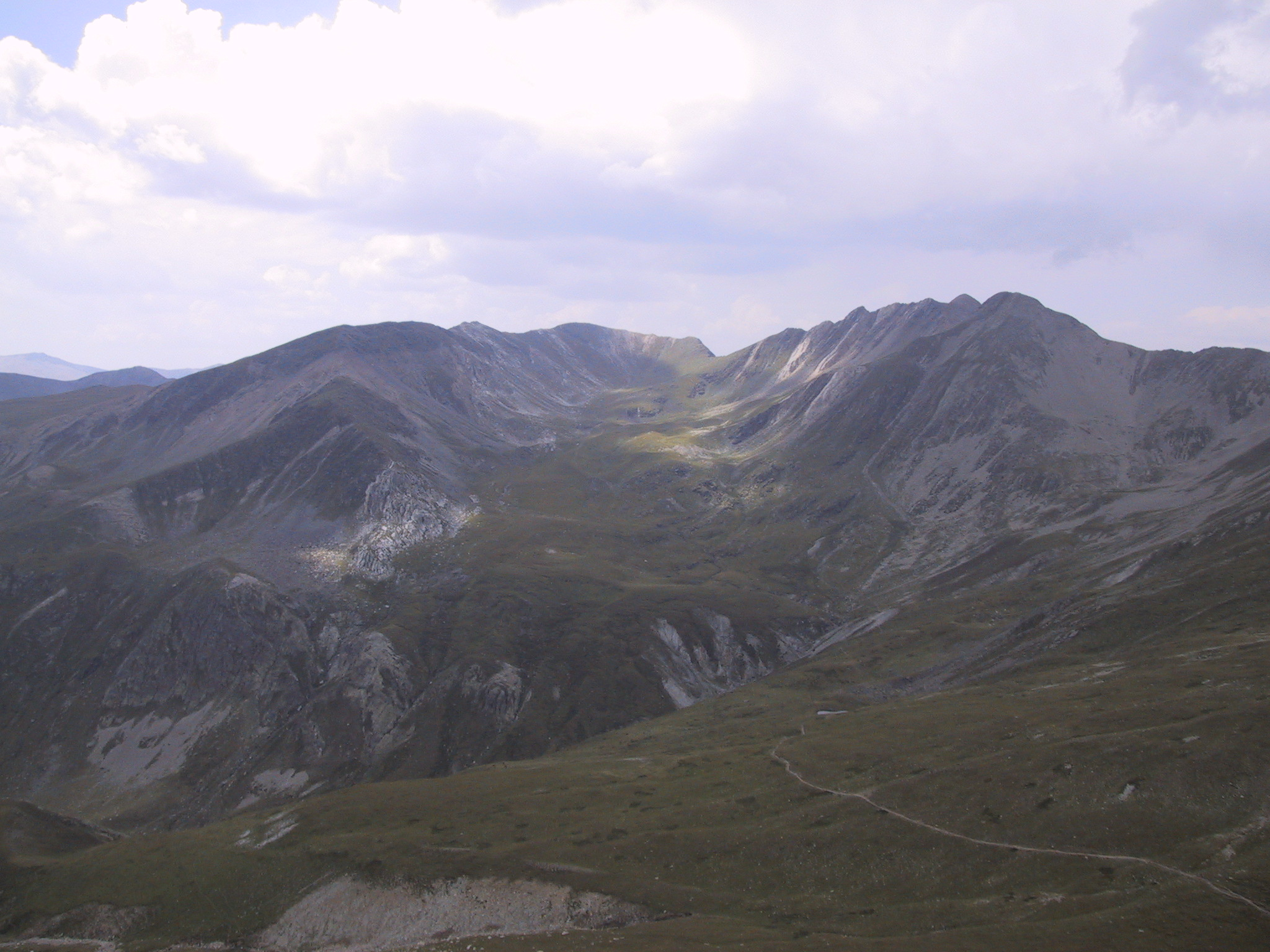 Pic de l'Infern des del coll del la Marrana (Ripollès) (Queralbs). Pirineus. This is a a photo of an emblematic summit in Catalonia, Spain, with id: CE-290076006 Object location42° 25′ 26.11″ N, 2° 12′ 49.81″ E